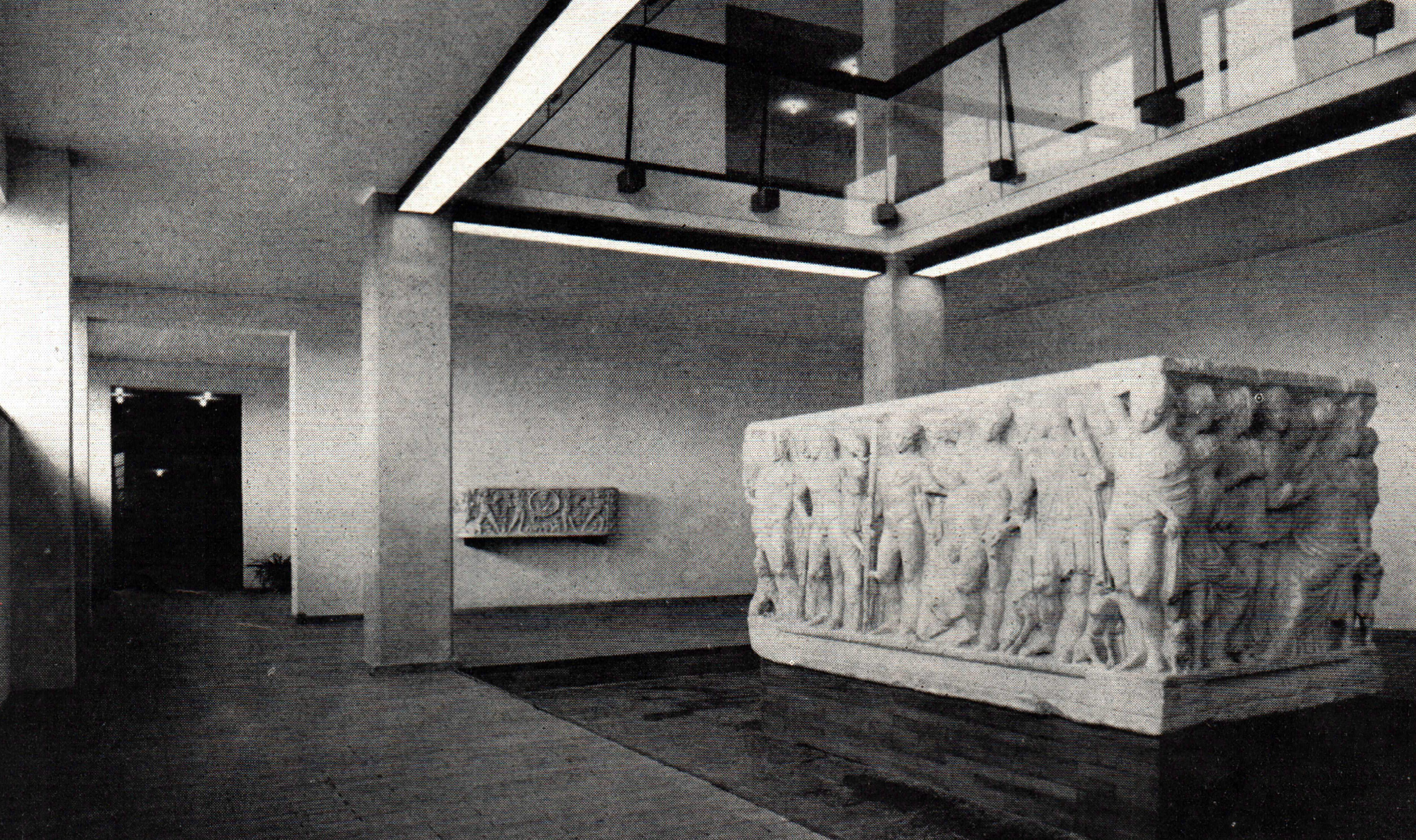 Il primo ballatoio, si affacciava sul vano in cui era esposto il Sarcofago di Fedra ed Ippolito, il pezzo più famoso della collezione (R. Delogu, Museo Diocesano ad Agrigento, in L'Architettura - cronache e storia, n. 130, Agosto 1966).